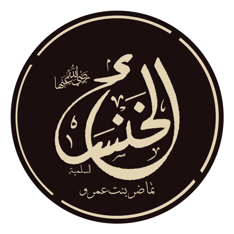 الخنساء